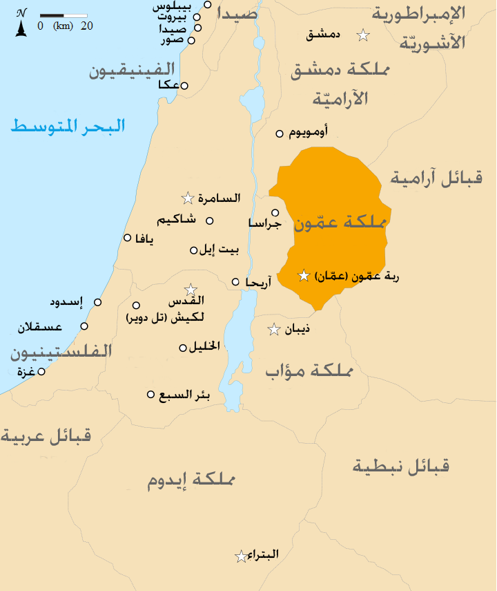 خريطة مملكة عمّون في بلاد الشام حوالي عام 830 ق.م